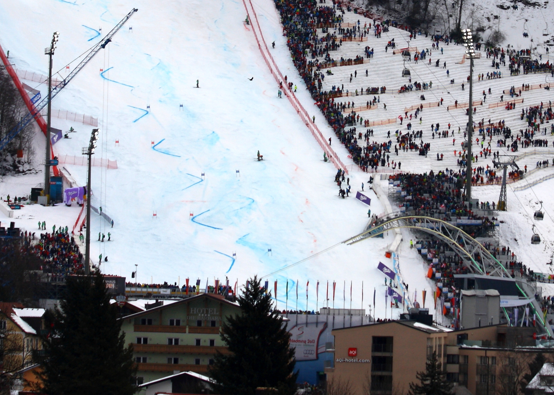 Zielarena des Planaistadions mit Voestalpine Skygate Lichteffektbogen zur Alpinen Skiweltmeisterschaft 2013 in Schladming